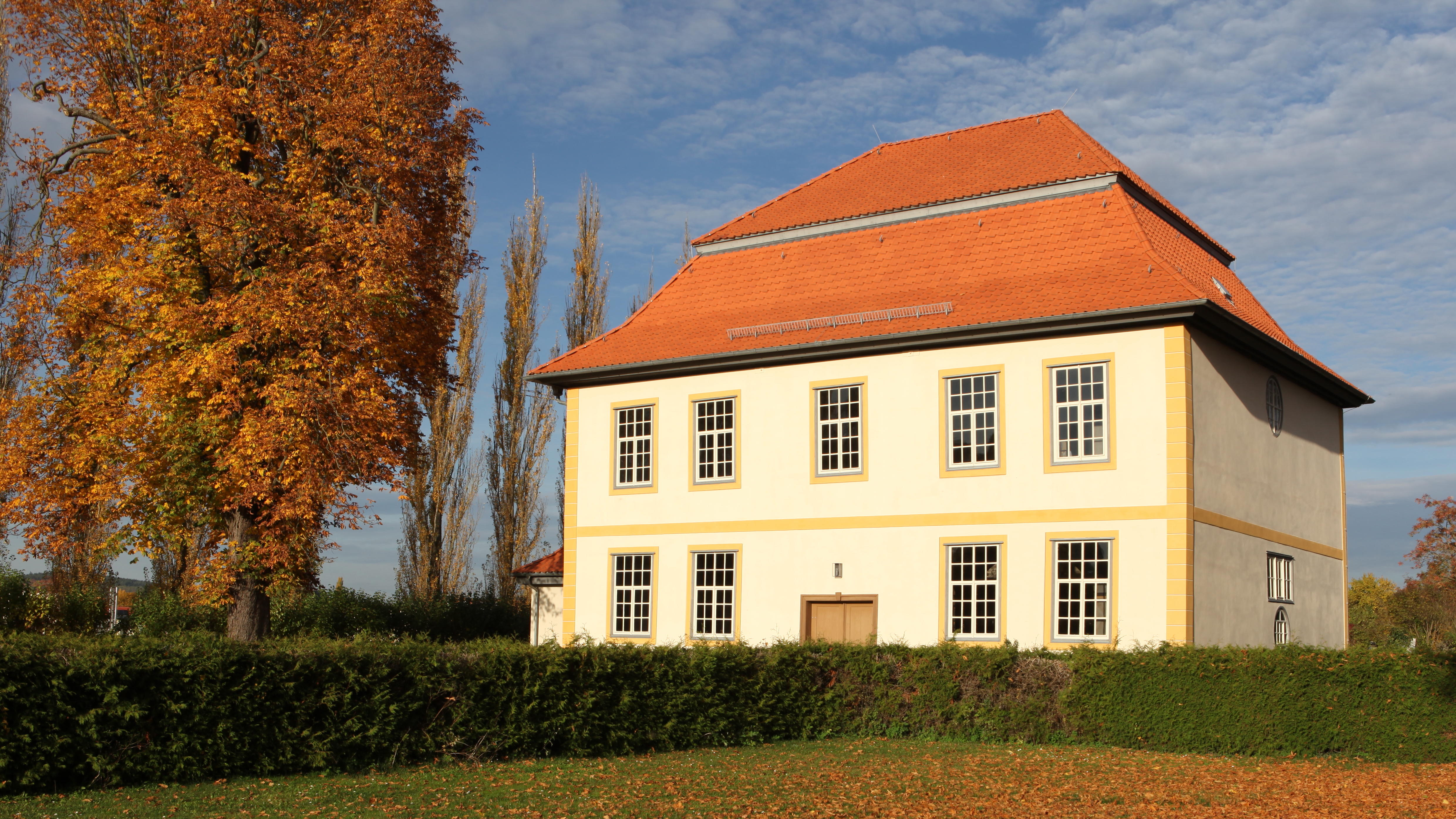 Römhild-Friedhofskrche